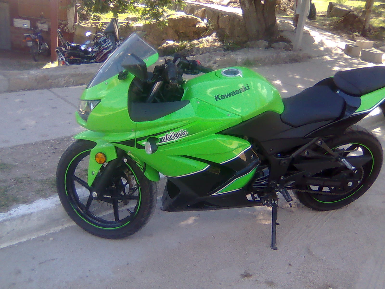 Kawasaki ninja250 de perfil en Cabalango CBA Argentina